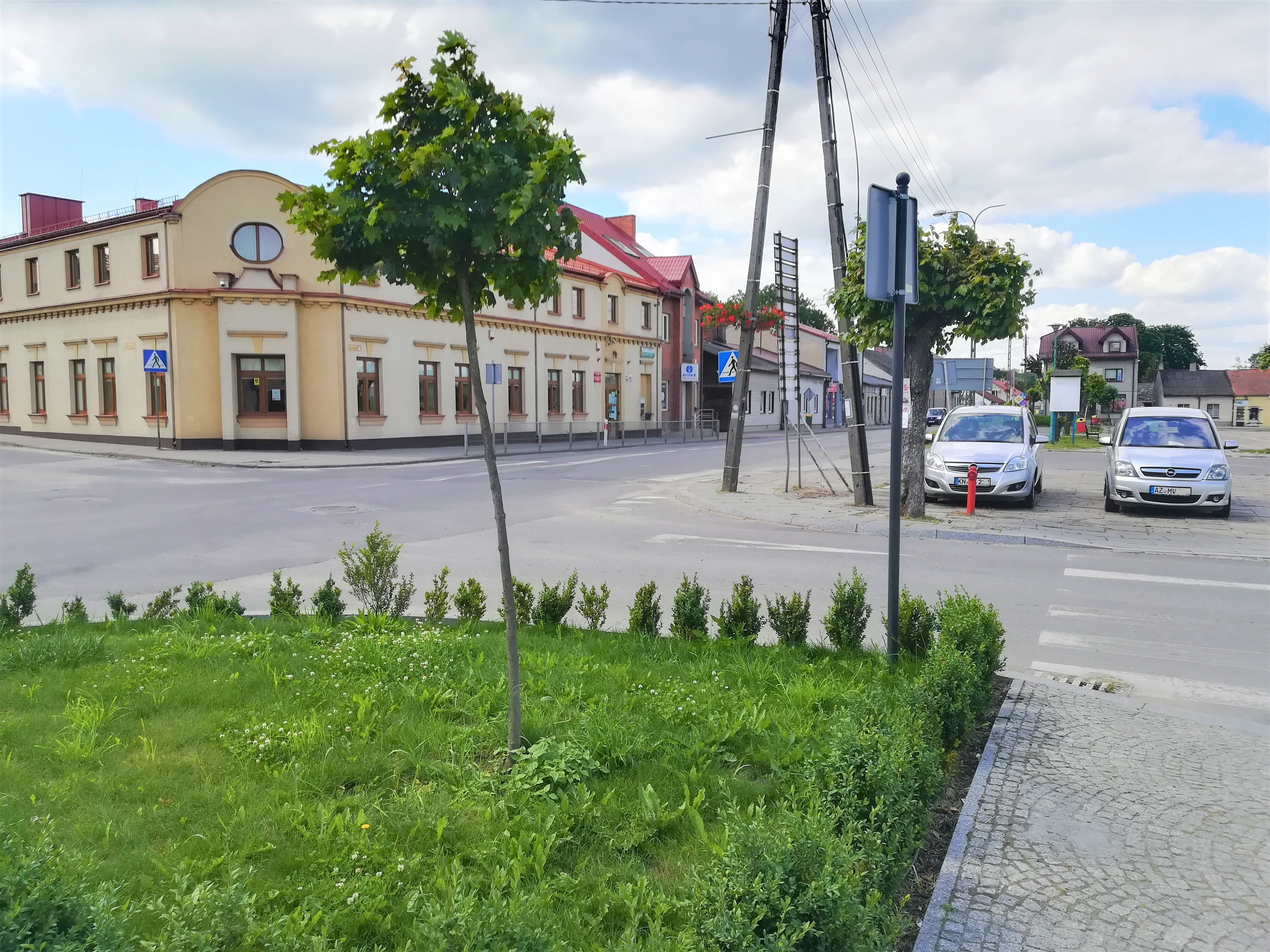 Centrum Burzenina w 2020 r.